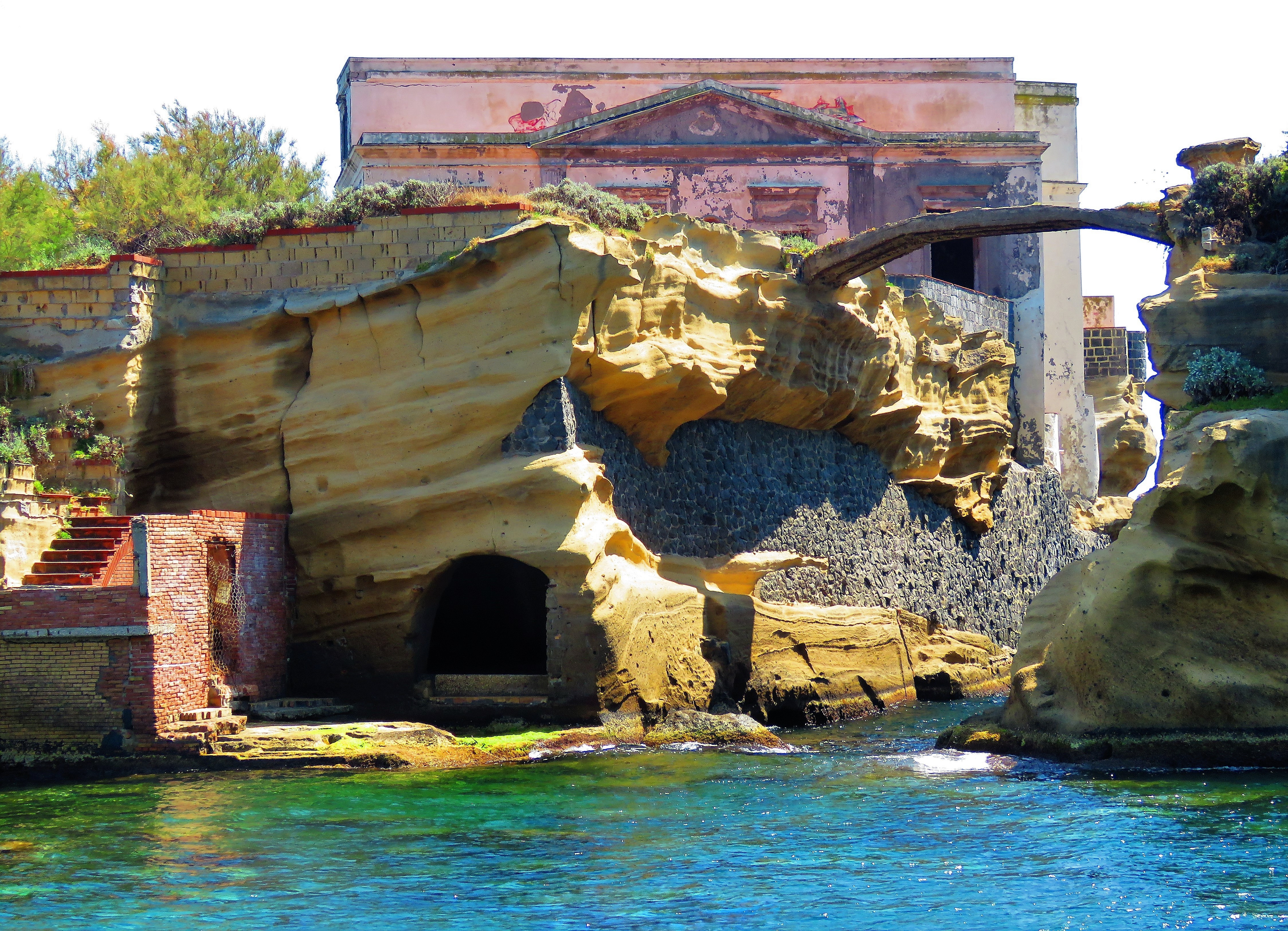 La Gaiola, il ponte e la casa.